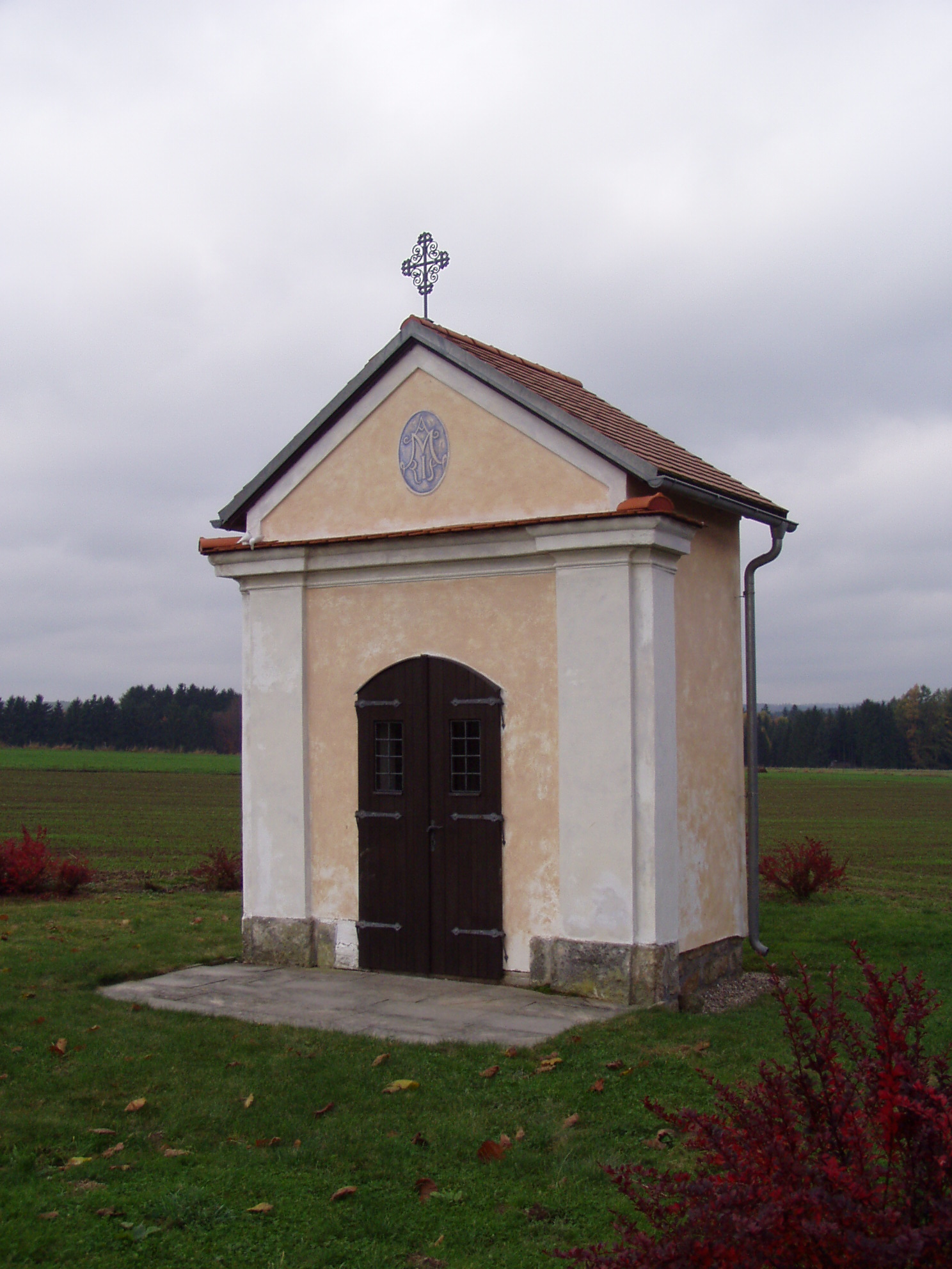 Kaple Panny Marie (Bezděkov nad Metují)